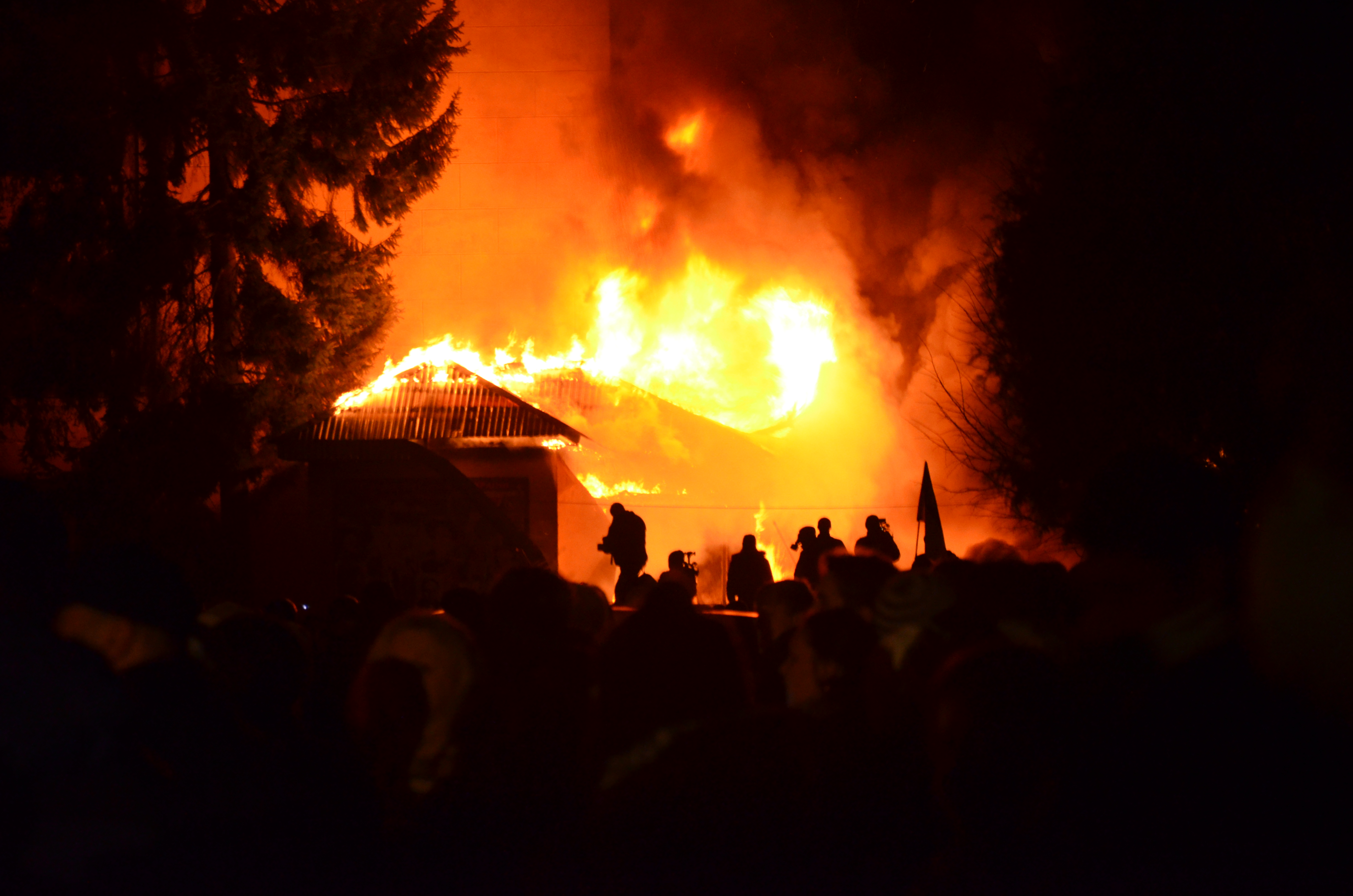 Палає КПП військової частини внутрішніх військ у Львові на вул. Стрийській.